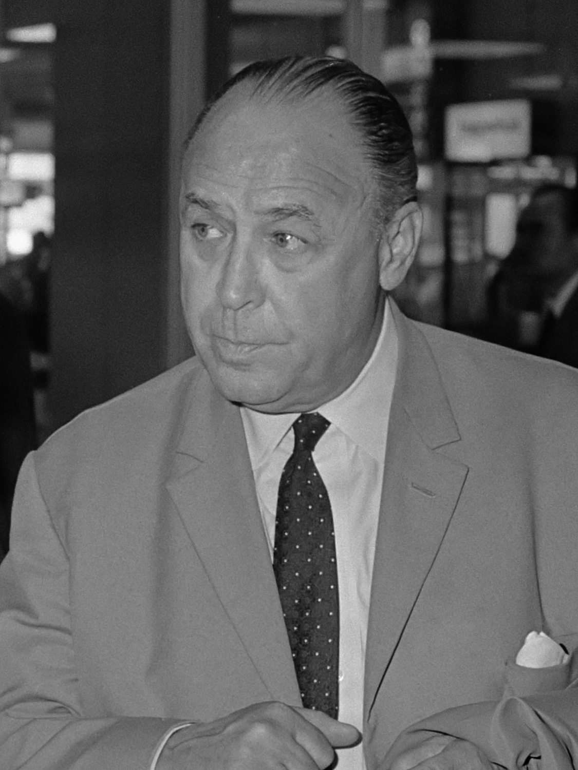 Rapid Wien elftal arriveert op Schiphol voor de wedstrijd tegen PSV. Technisch directeur Rappan met een speler 30 september 1969